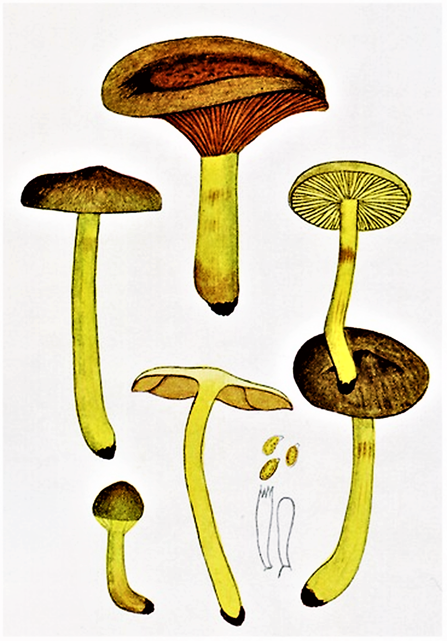 Giacomo Bresadola: Cortinarius cinnamomeus (L., 1753) Gray (1821)